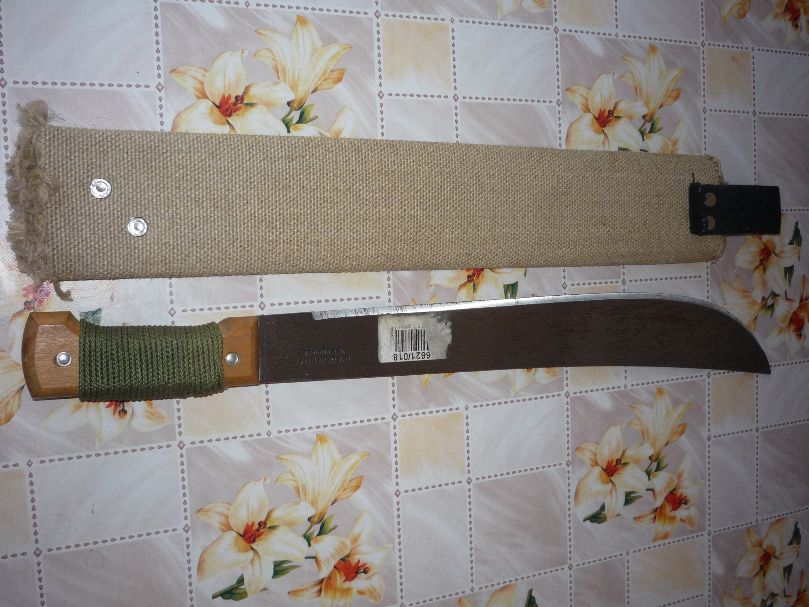 Autor fotografie Jiří Zelenka. Nádobí a nářadí Skautského kuchaře. Zařízení pro táborníka (skauta nebo trampa) ve volné přírodě. Nádoby na vaření, zásobníky na vodu, nože, mačety, sekery a zapalovače ohně. Polní lopatka na úklid terénu po ohništi. Nebo speciální krabička KPZ. Junák - Český skaut. Czech Republic.